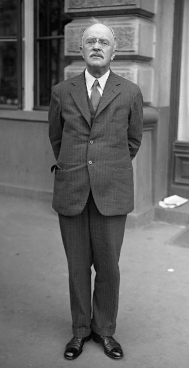 Oswald Parnson Villard, der Herausgeber der bekannten amerikanischen Zeitschrift "The Nation" weilt zurzeit in Berlin! Oswald Parnson Villard während seines Aufenthaltes in Berlin